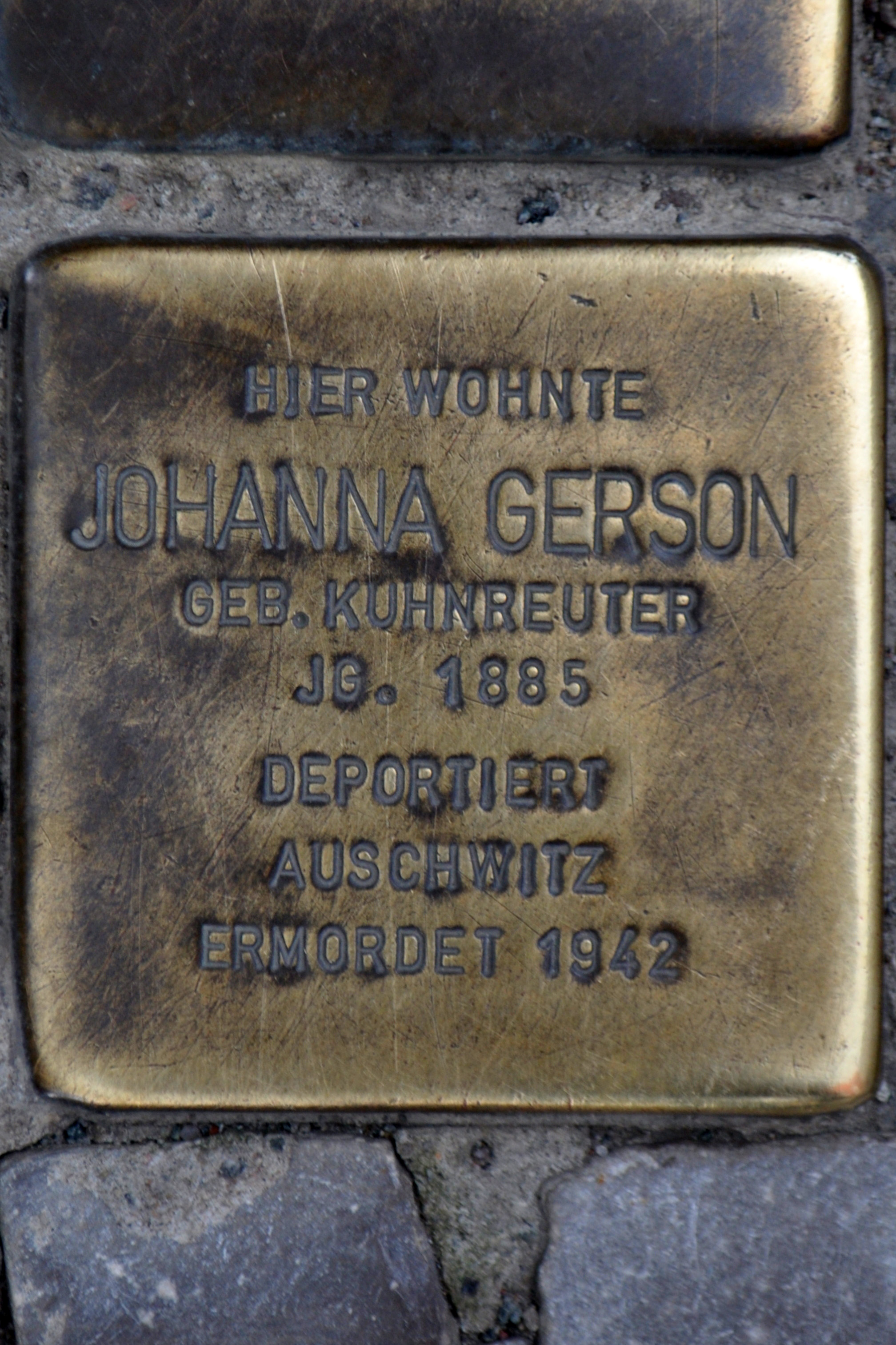 Stolperstein in Stralsund, Tribseer Straße. Der Stein ist einer von drei Stolpersteinen an diesem Ort. Text: Hier wohnte Johanna Gerson geb. Kuhnreuter Jg. 1885 deportiert Auschwitz ermordet 1942